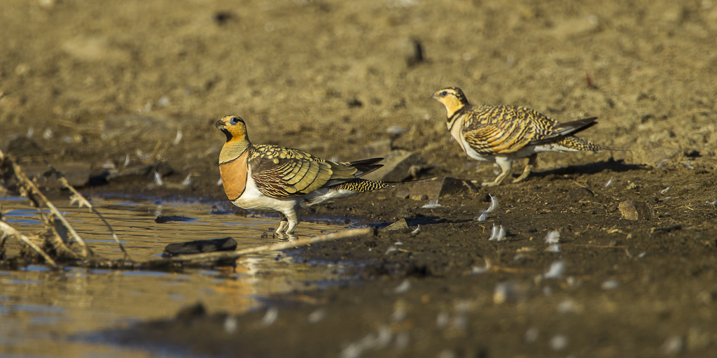 Pin-tailed Sandgrouse - Castuera - Estremadura_S4E6278